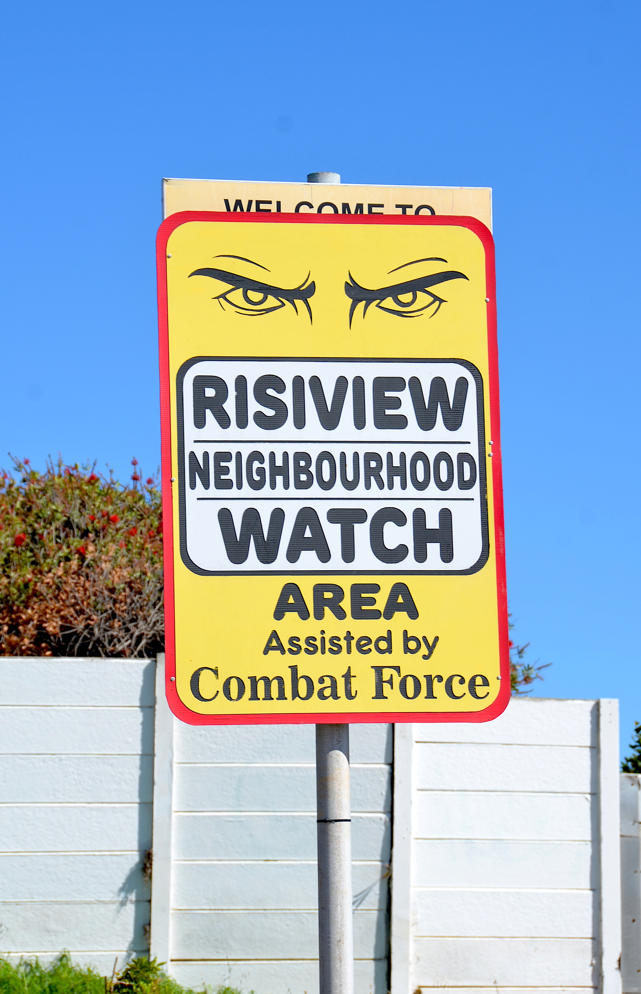 Hinweisschild Nachbarschaftswache, Combat Force (Südafrika)